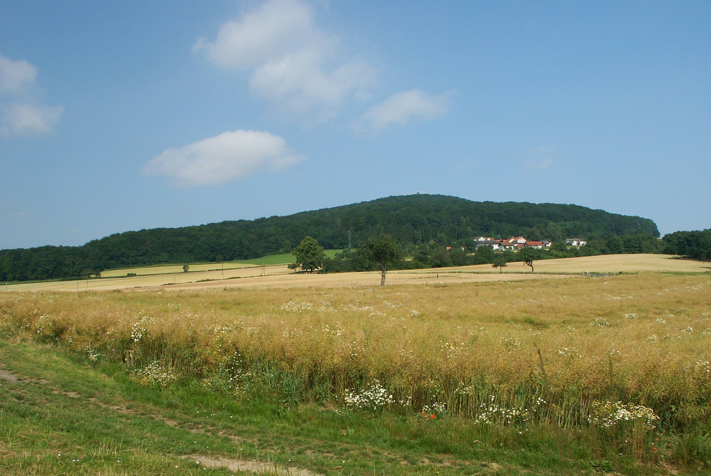 Der Soisberg in der Kuppenrhöhn, davor das Dorf Hohenroda-Solislieden